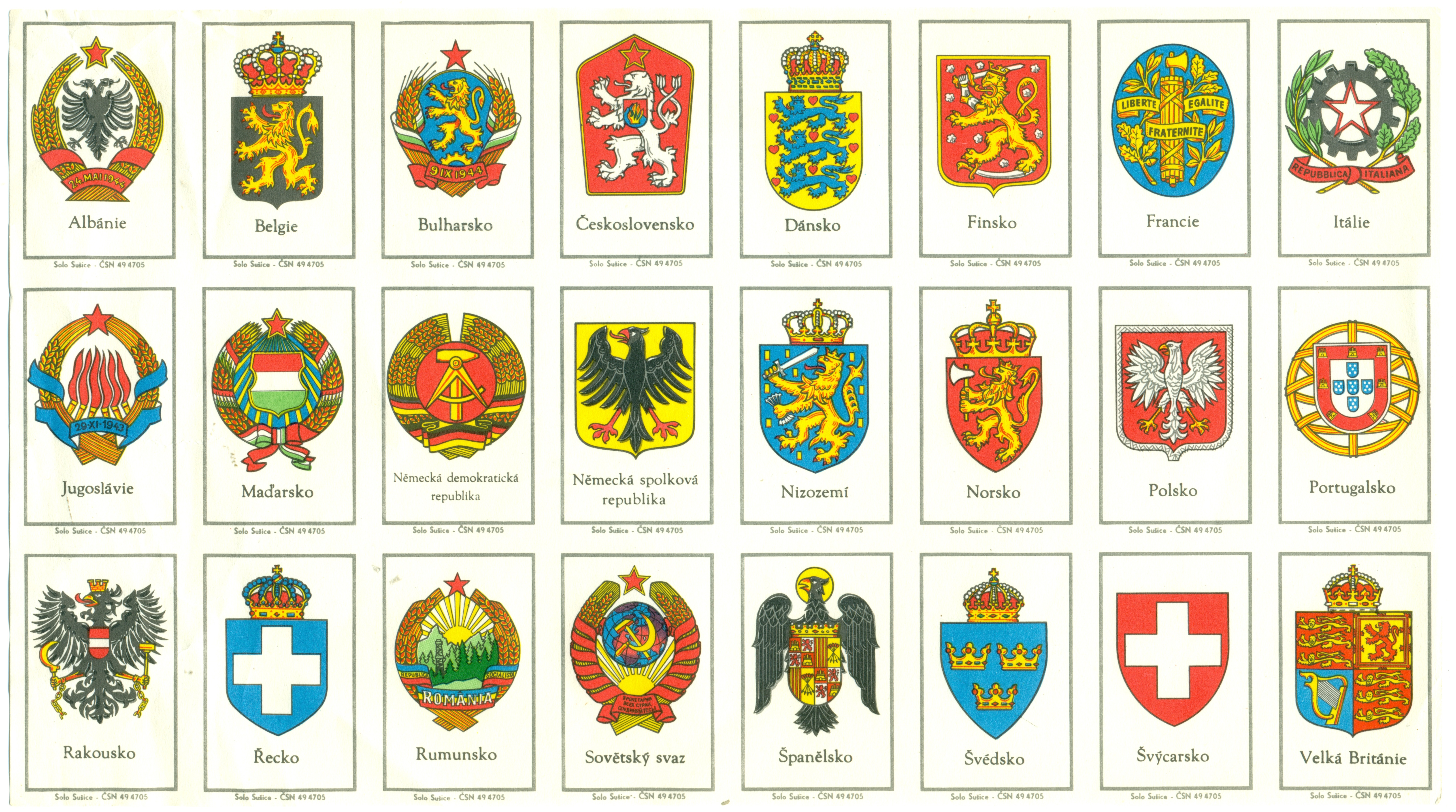 nálepky z roku 1970